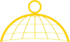 Српски (ћирилица): Технички приказ Вилбал капије(гола)